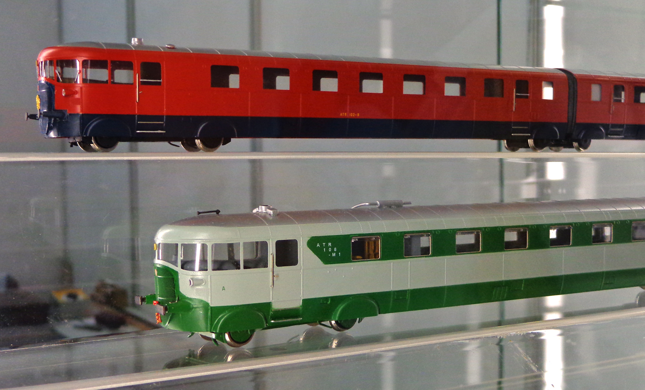 Modelli in scala H0 di due autotreni ATR 100 delle Ferrovie dello Stato, esposti alla fiera di modellismo "Hobby Model Expo" del 2013, nello stand del Gruppo Modellisti Romani.